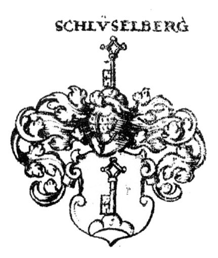 Wappen der Adelsfamilie Schlüsselberg - Grafen des Heiligen Römischen Reiches